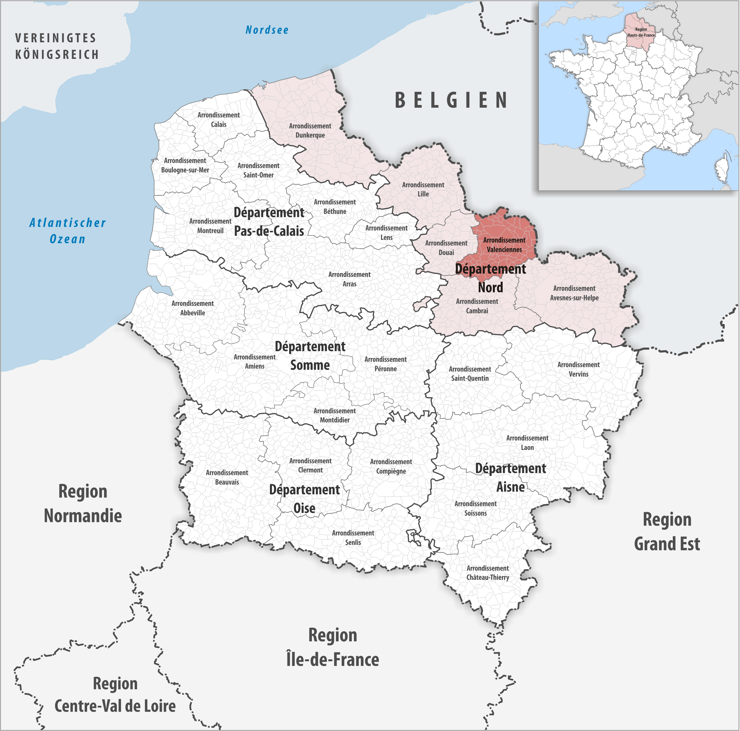 Lage des Arrondissements Valenciennes